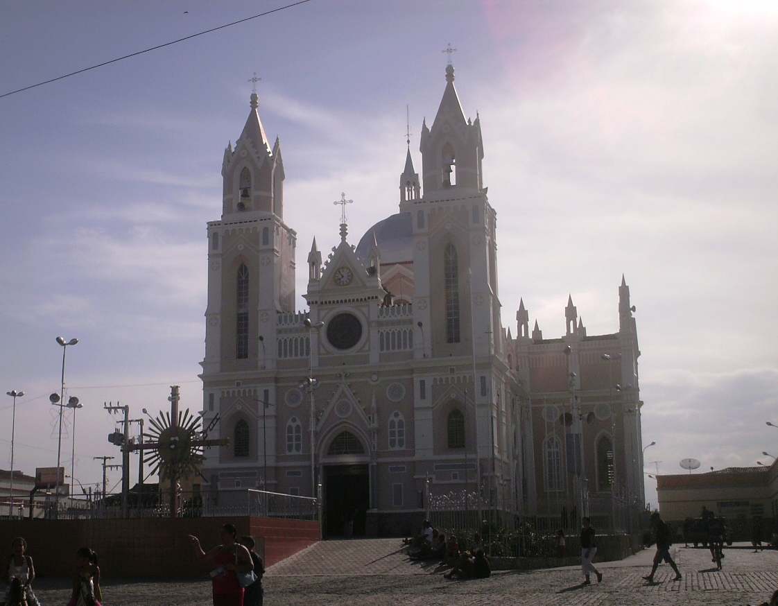 Basílica de São Francisco de Assis em Canindé, Ceará, Brasil.